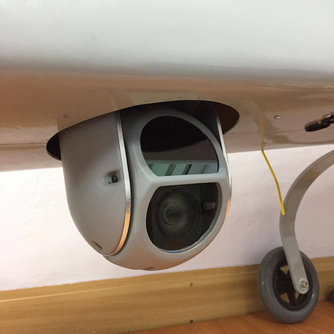 Друга версія гіростабілізованої платформи, що встановлюється на PD1